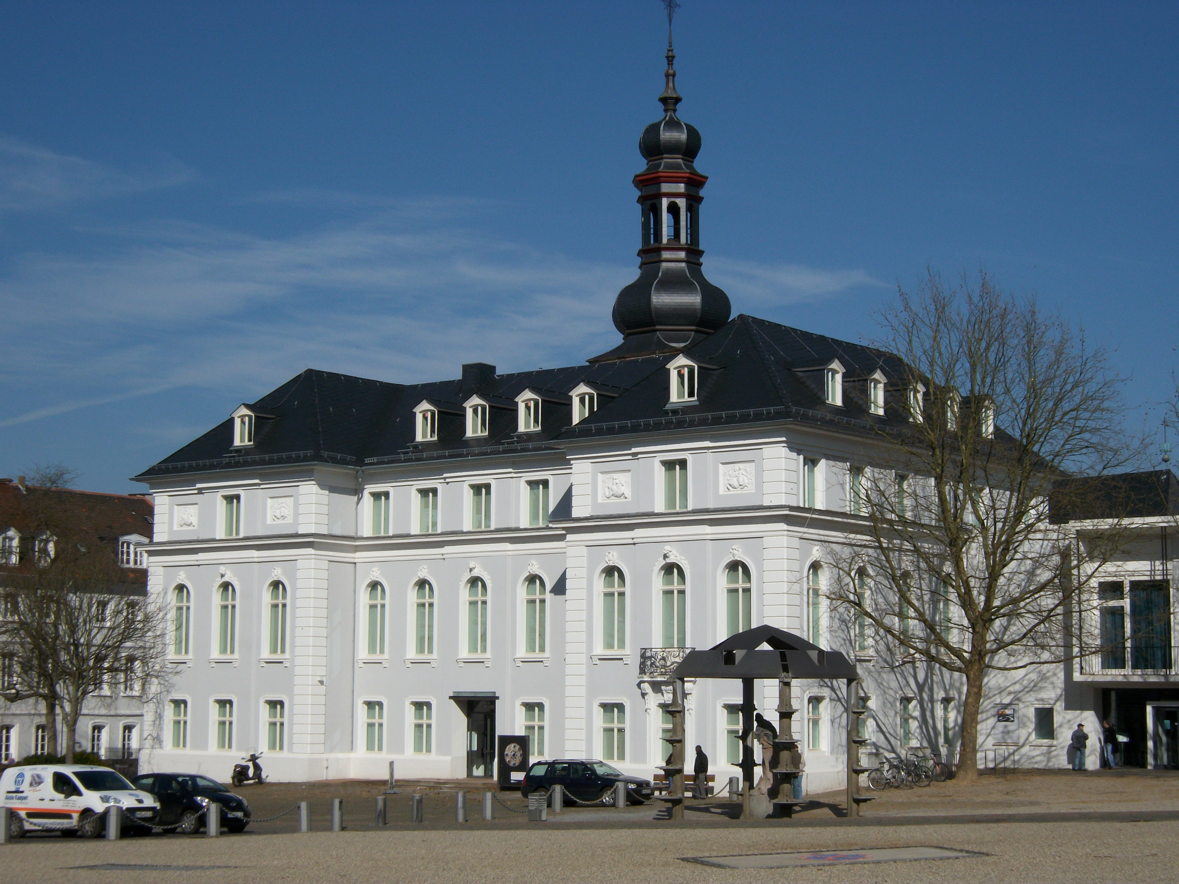 Museum für Vor- und Frühgeschichte und Alte Sammlung (Saarbrücken)